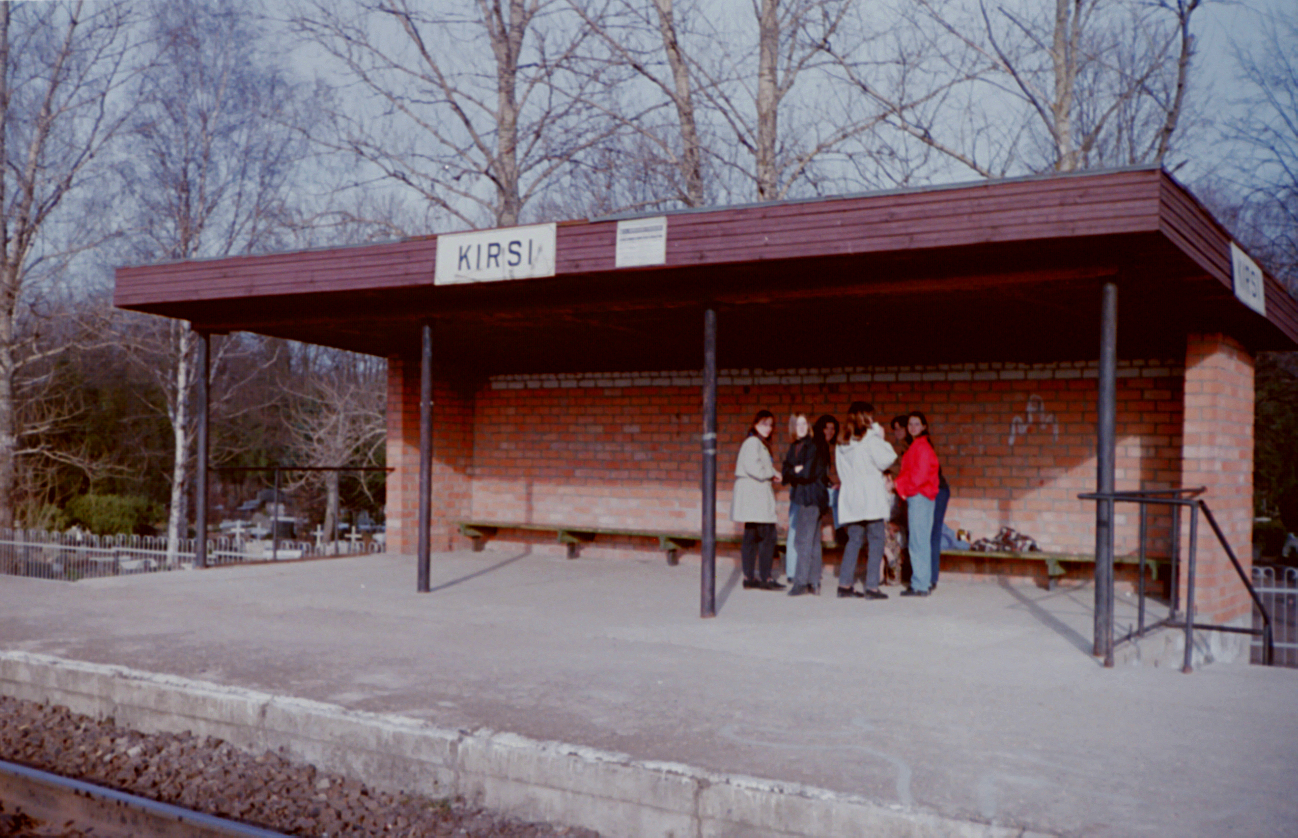 Kirsi raudteepeatus